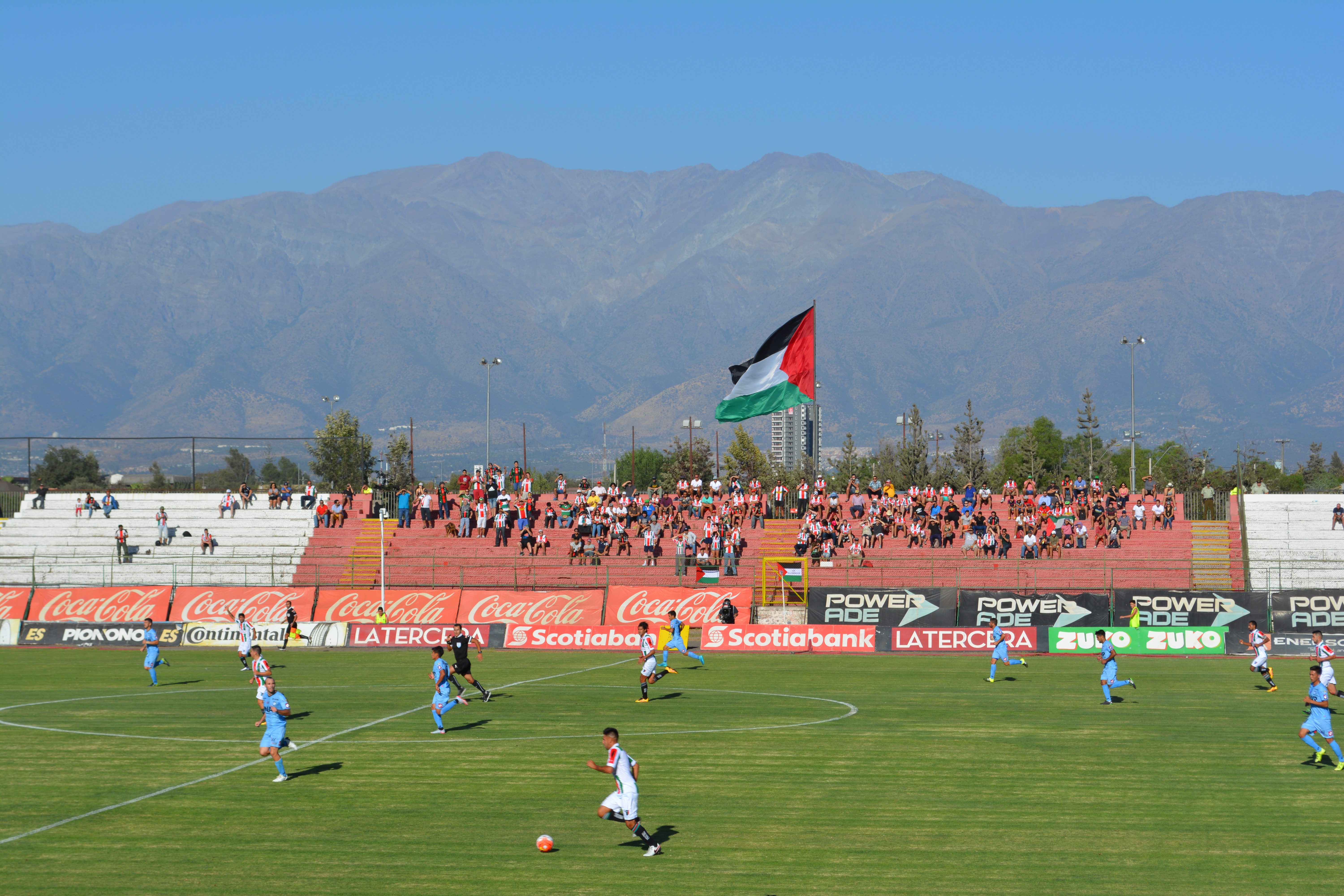 Palestino - Iquique, 26-02-2016, Estadio Municipal de La Cisterna, Santiago, Chile